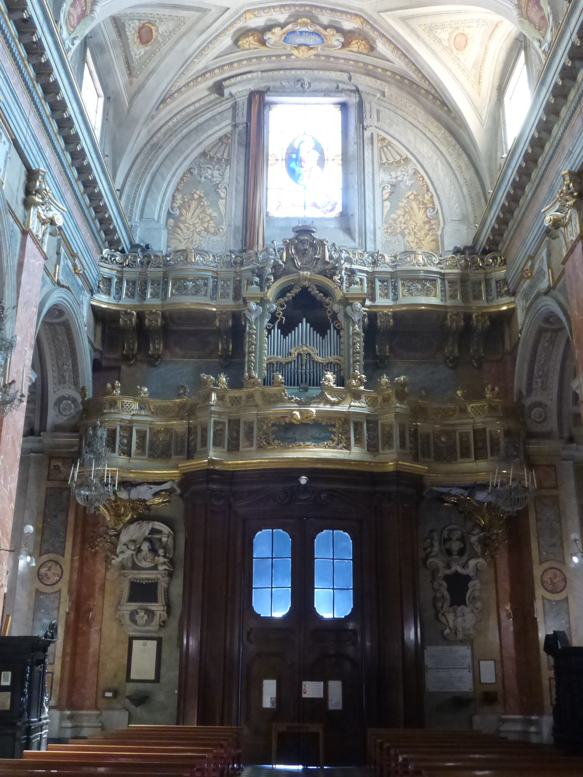 Roma, S. Maria della Scala, controfacciata e organo.